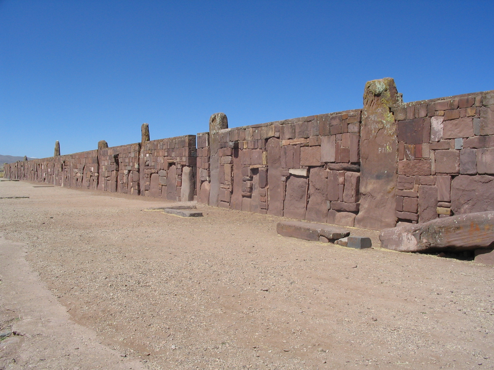 Photo du mur droit du temple Kalasasaya (à droite quand on est en face). Photo prise par User:Anakin en 2005.